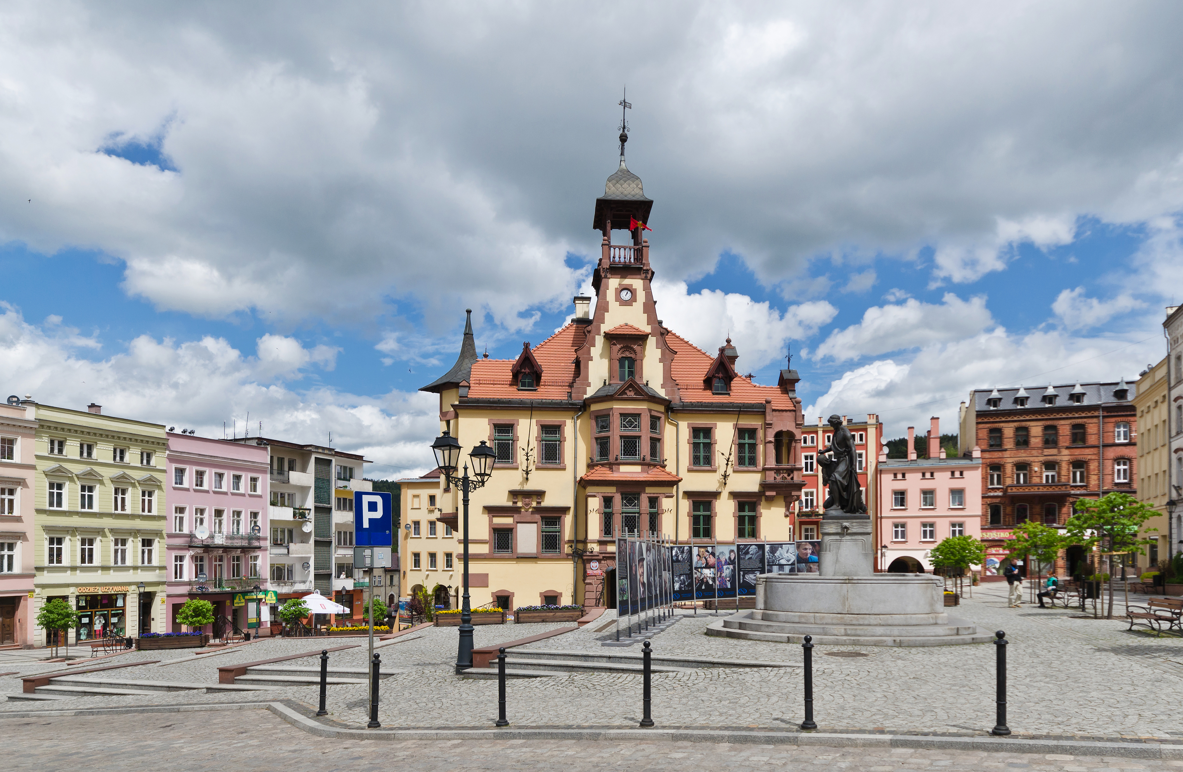 Nowa Ruda, ratusz, ok. 1845, 1892-1894